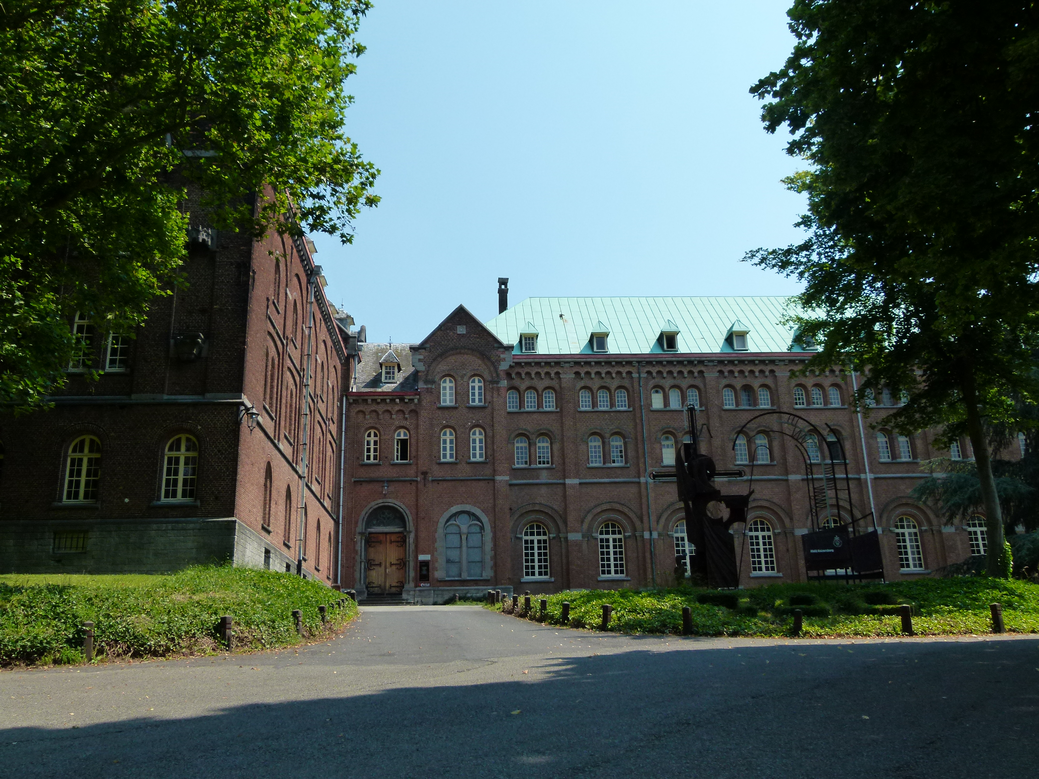 Vooraanzicht Abdij van Keizersberg te Leuven